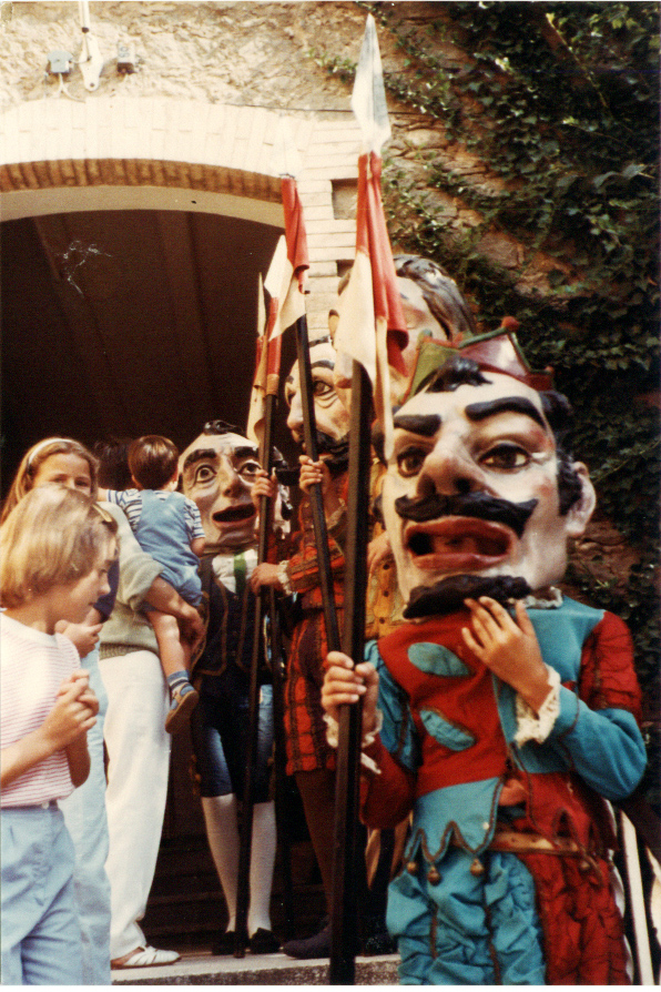 Ball tradicional dels nans de l'Ametlla de Merola